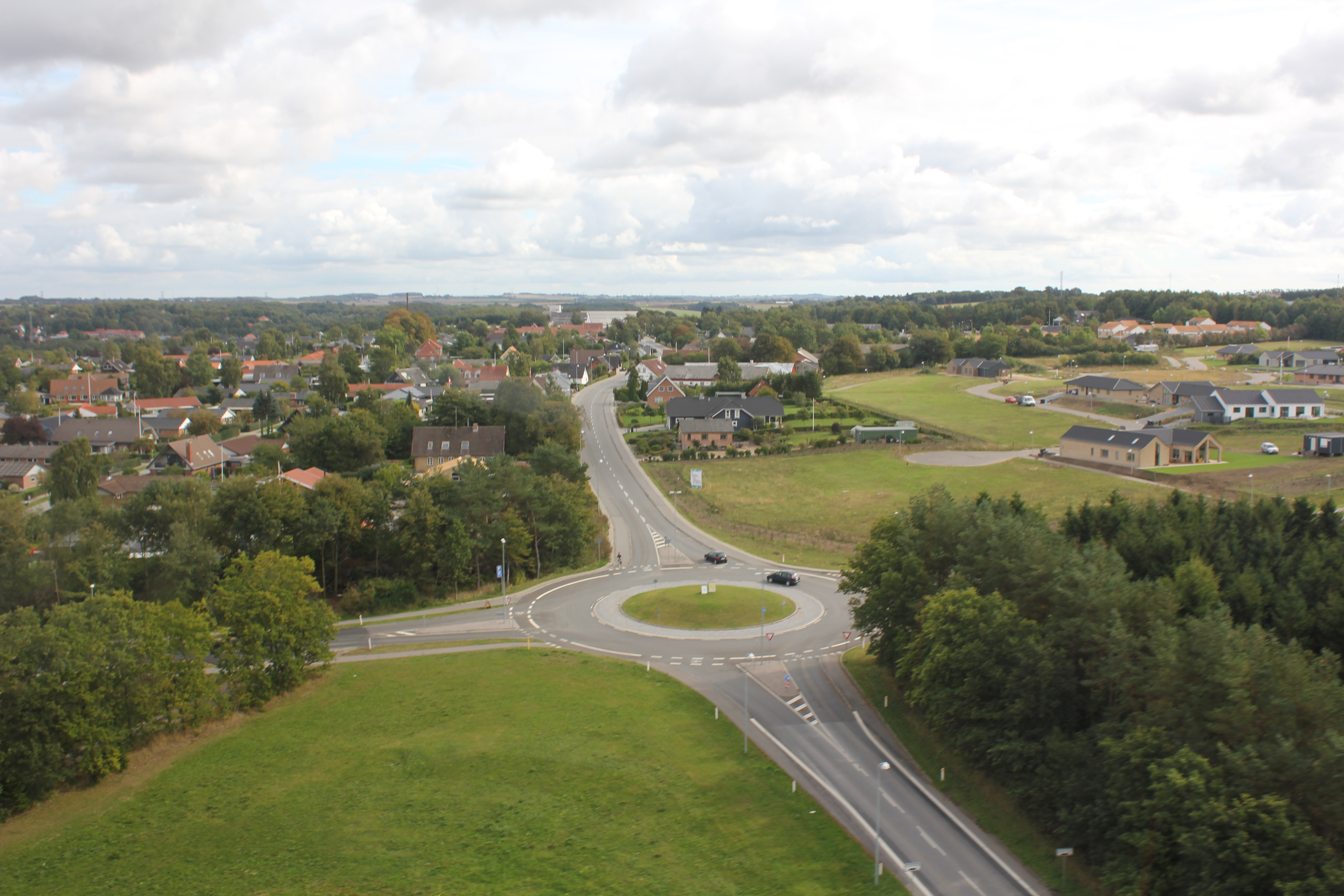 Rundkørslen mellem Vester Ringvej og Hammelvej. Fotoet er taget fra en helikopter under landing. Fotoet er taget i sep. 2013.